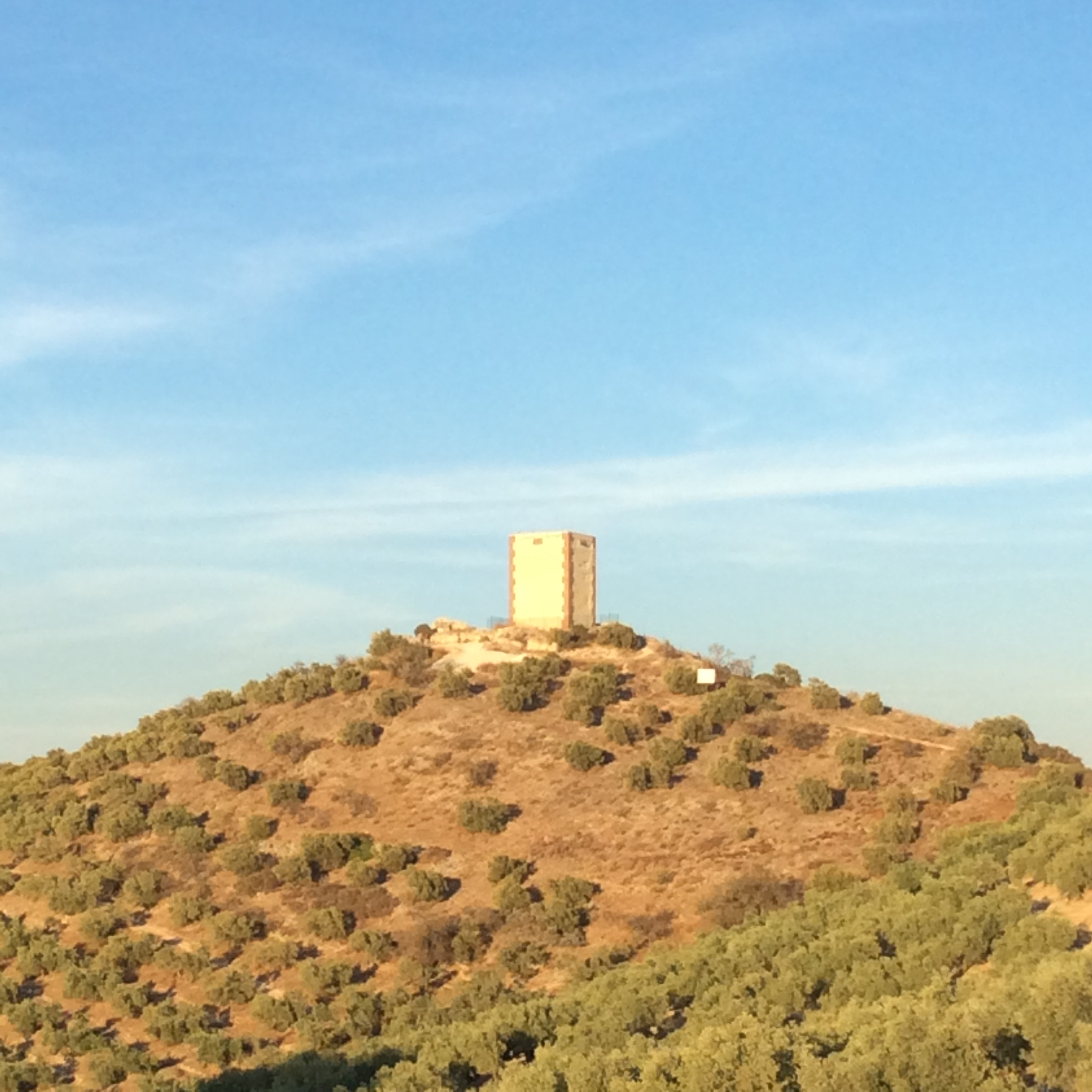 Castillo Medieval "Anzur"